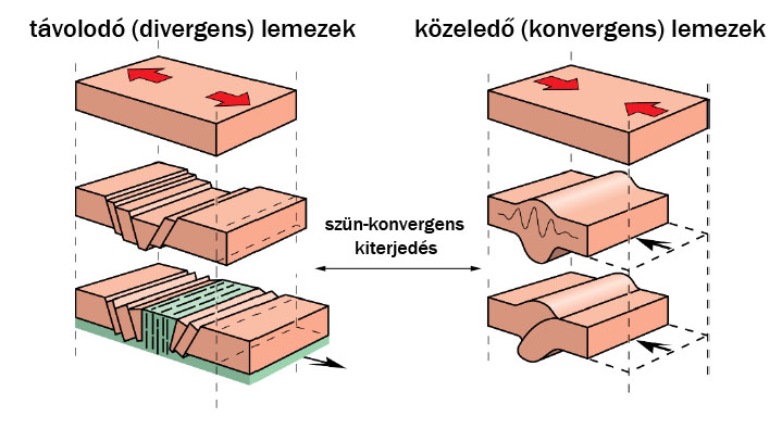 Kőzetlemek klasszifikációja